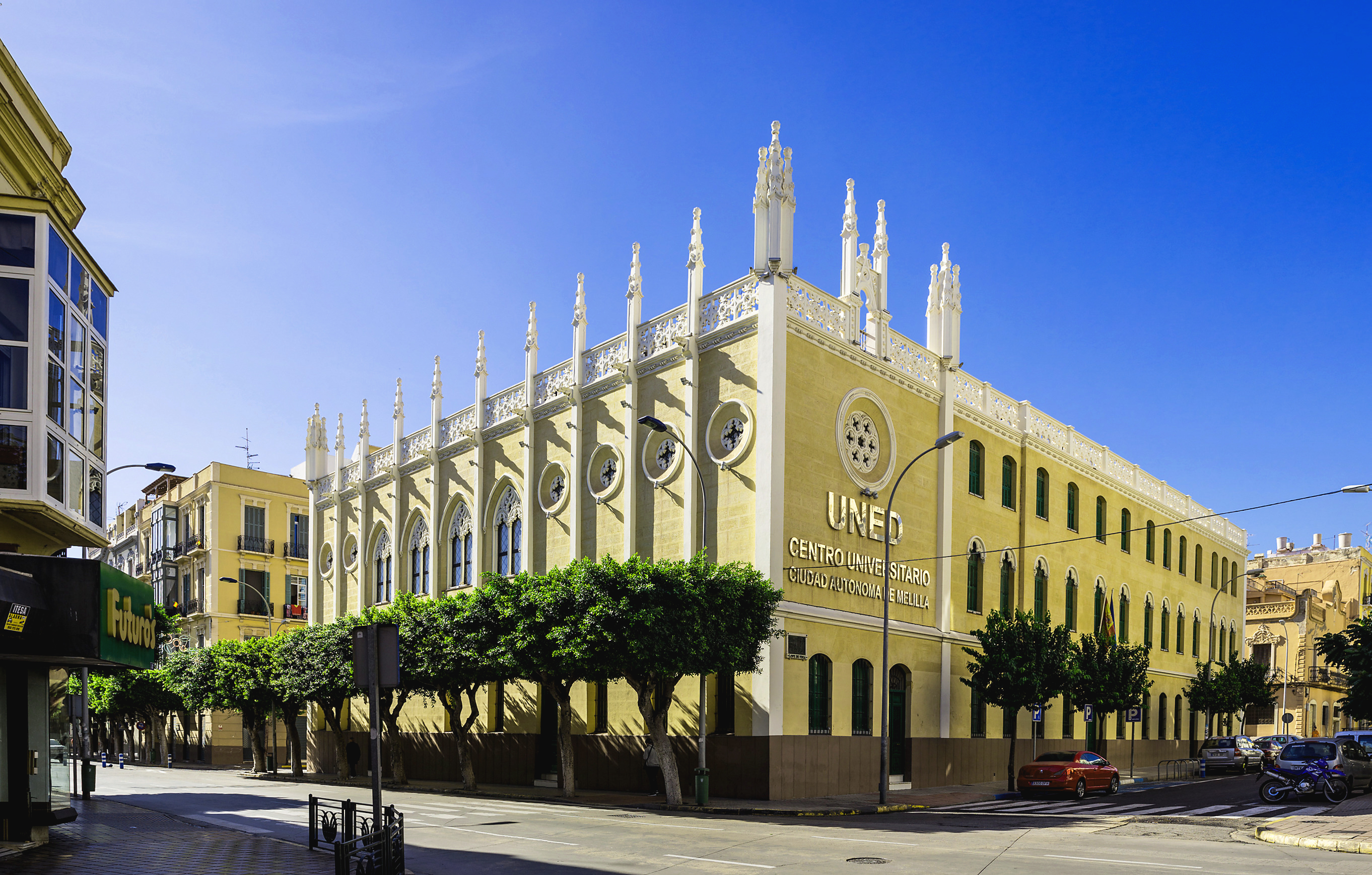 SEDE DEL CENTRO ASOCIADO DE LA UNIVERSIDAD NACIONAL DE EDUCACIÓN A DISTANCIA EN MELILLA